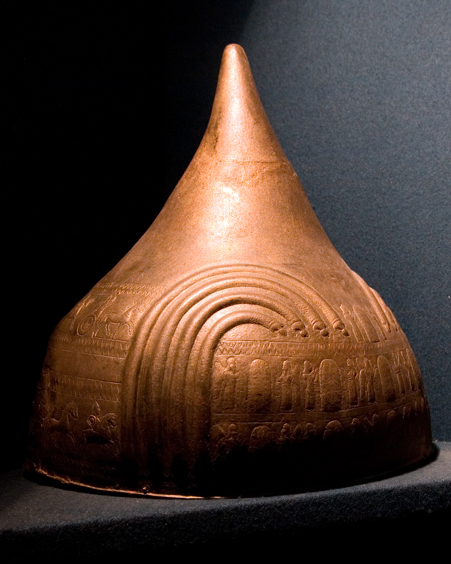 Urartian Bronze Helmet